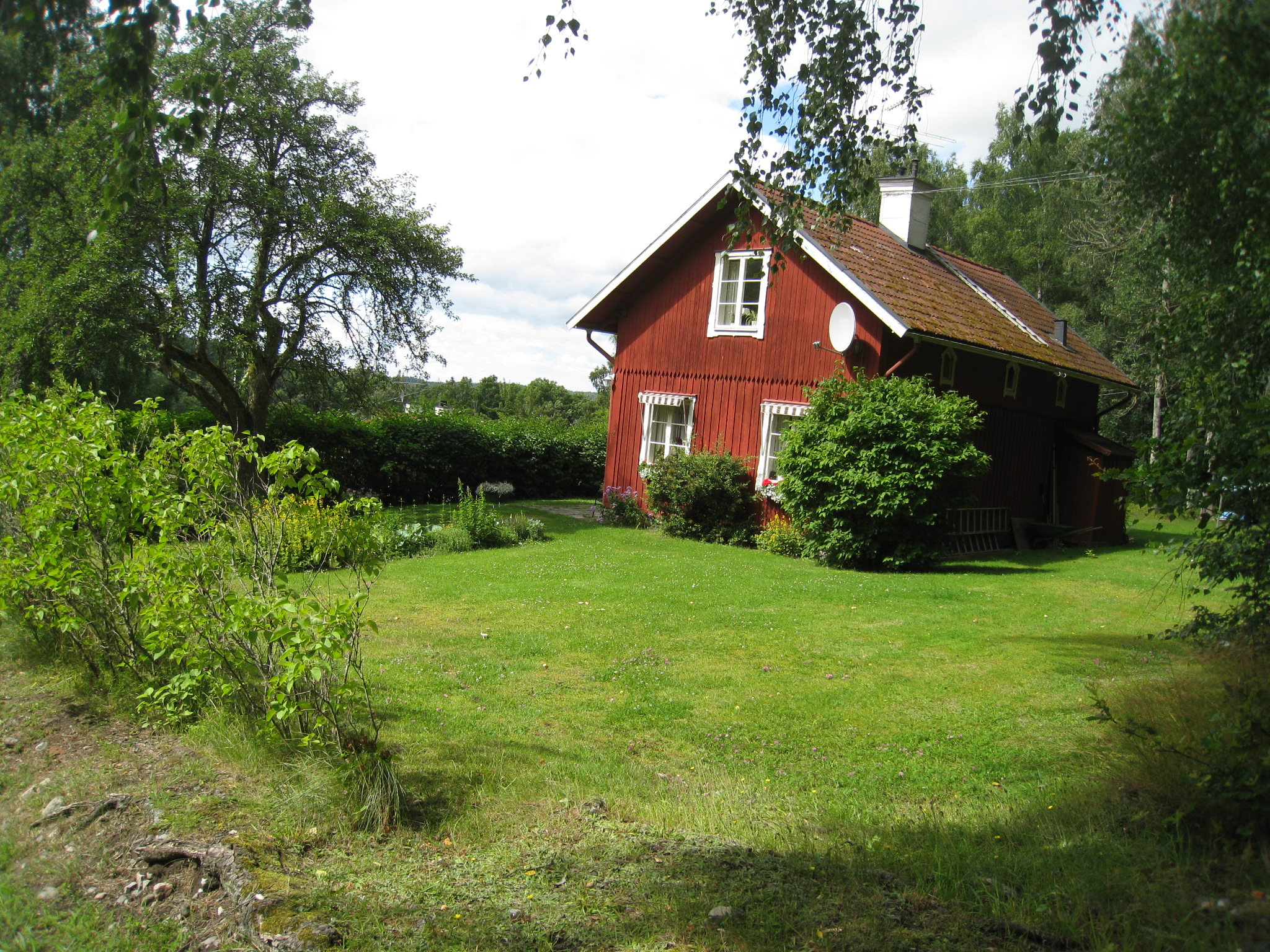 Baset sommarvilla och torpstuga ligger vid Mälaren mellan Görvälnsbadet och Sanduddens båthamn. Baset ligger i Görvälns naturreservat i Järfälla kommun, Stockholms län. Sedan 1984 hyr Järfälla pingstförsamling, Aspnäskyrkan, Baset för att användas till konferensverksamhet.